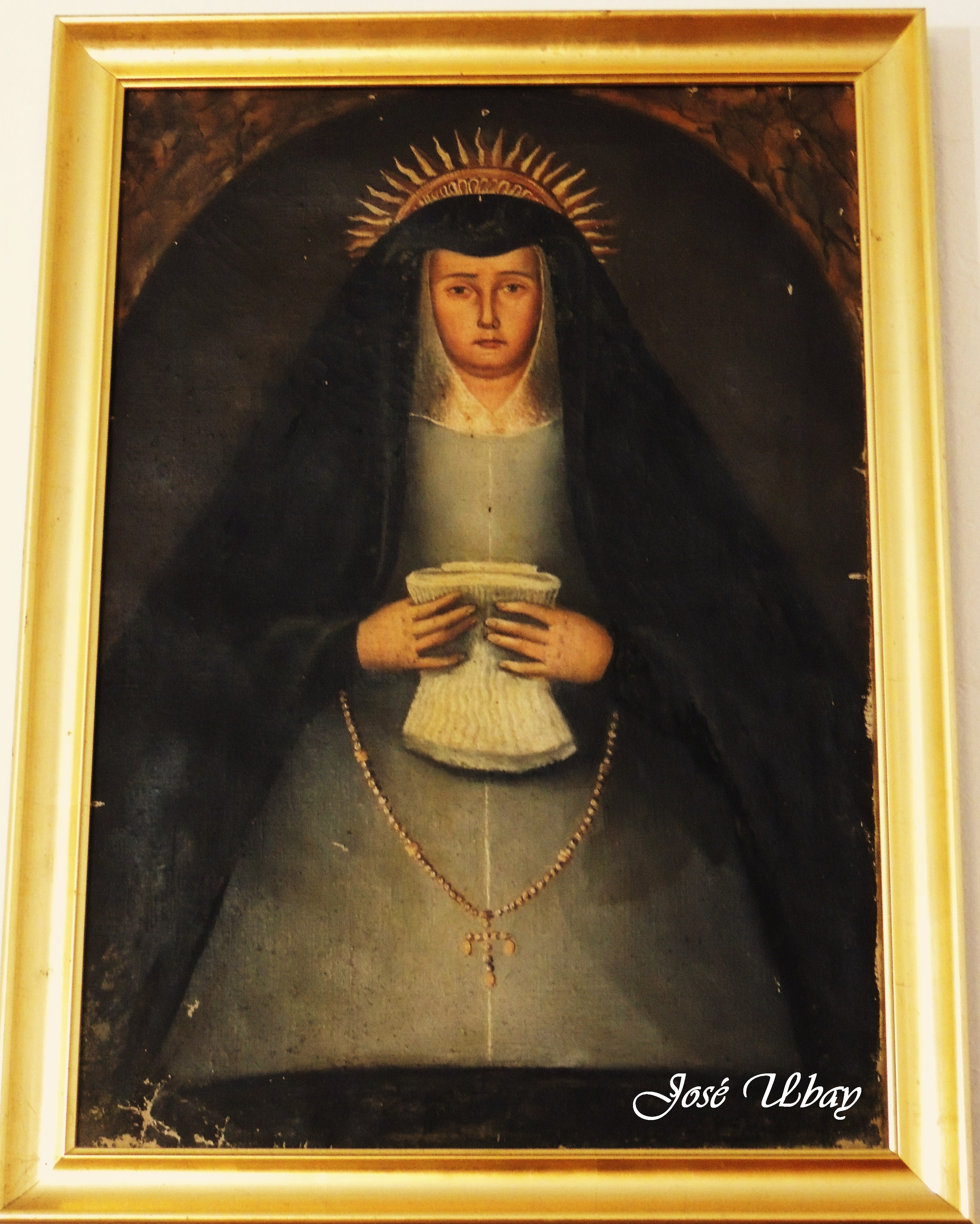 Vera Efigie de Nuestra Señora de la Soledad de la Portería Coronada. Siglo XIX? Anónimo. Parroquia de San Juan Bautista - San Cristóbal de La Laguna.